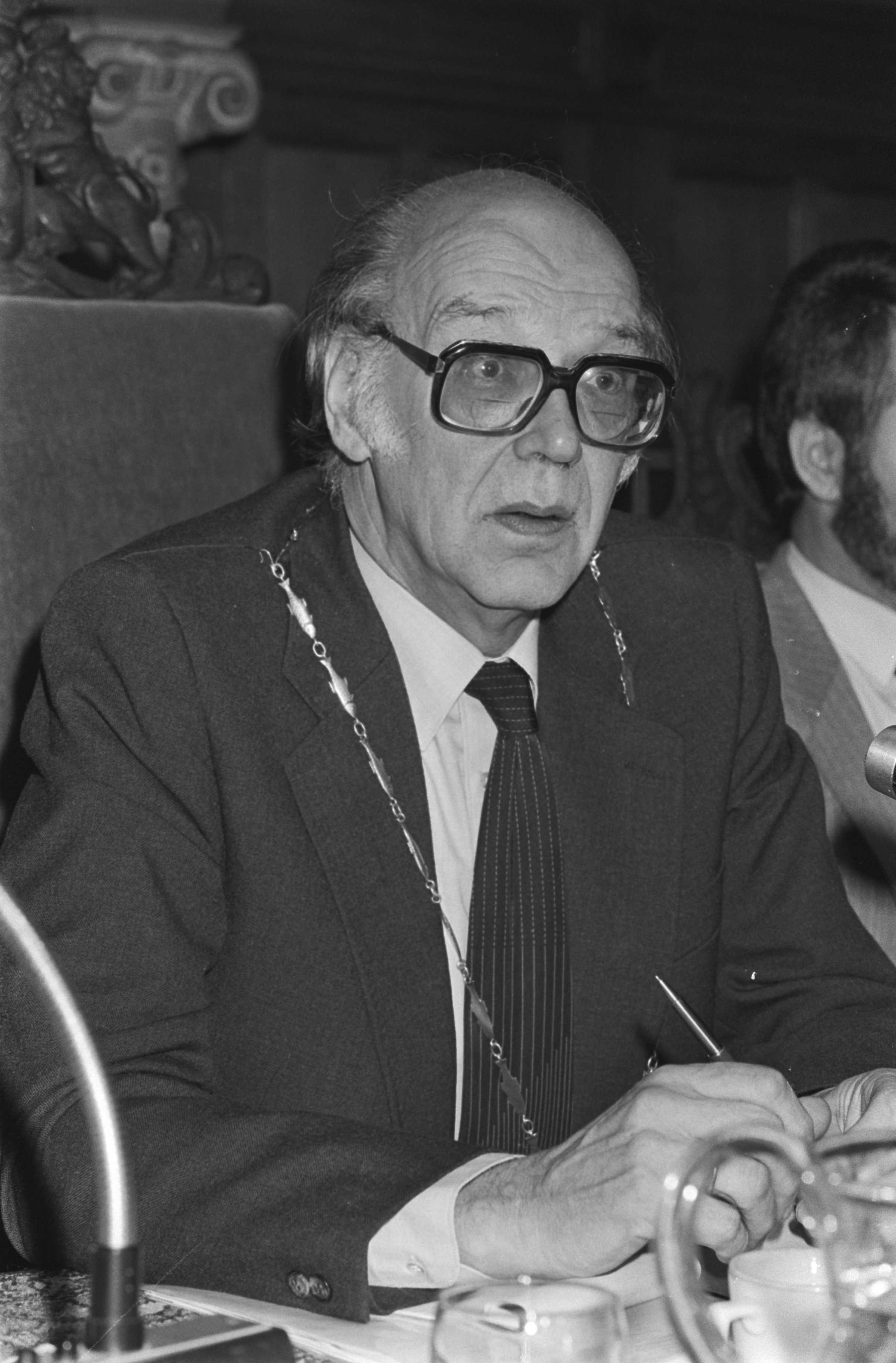 Collectie / Archief : Fotocollectie Anefo Reportage / Serie : Gemeenteraad Zandvoort vergadert over het circuit Beschrijving : Burgemeester H. Machielsen van Zandvoort tijdens de vergadering Datum : 3 november 1981 Locatie : Noord-Holland, Zandvoort Trefwoorden : burgemeesters, portretten, vergaderingen Persoonsnaam : Machielsen, H. Fotograaf : Antonisse, Marcel / Anefo Auteursrechthebbende : Nationaal Archief Materiaalsoort : Negatief (zwart/wit) Nummer archiefinventaris : bekijk toegang 2.24.01.05 Bestanddeelnummer : 931-7830